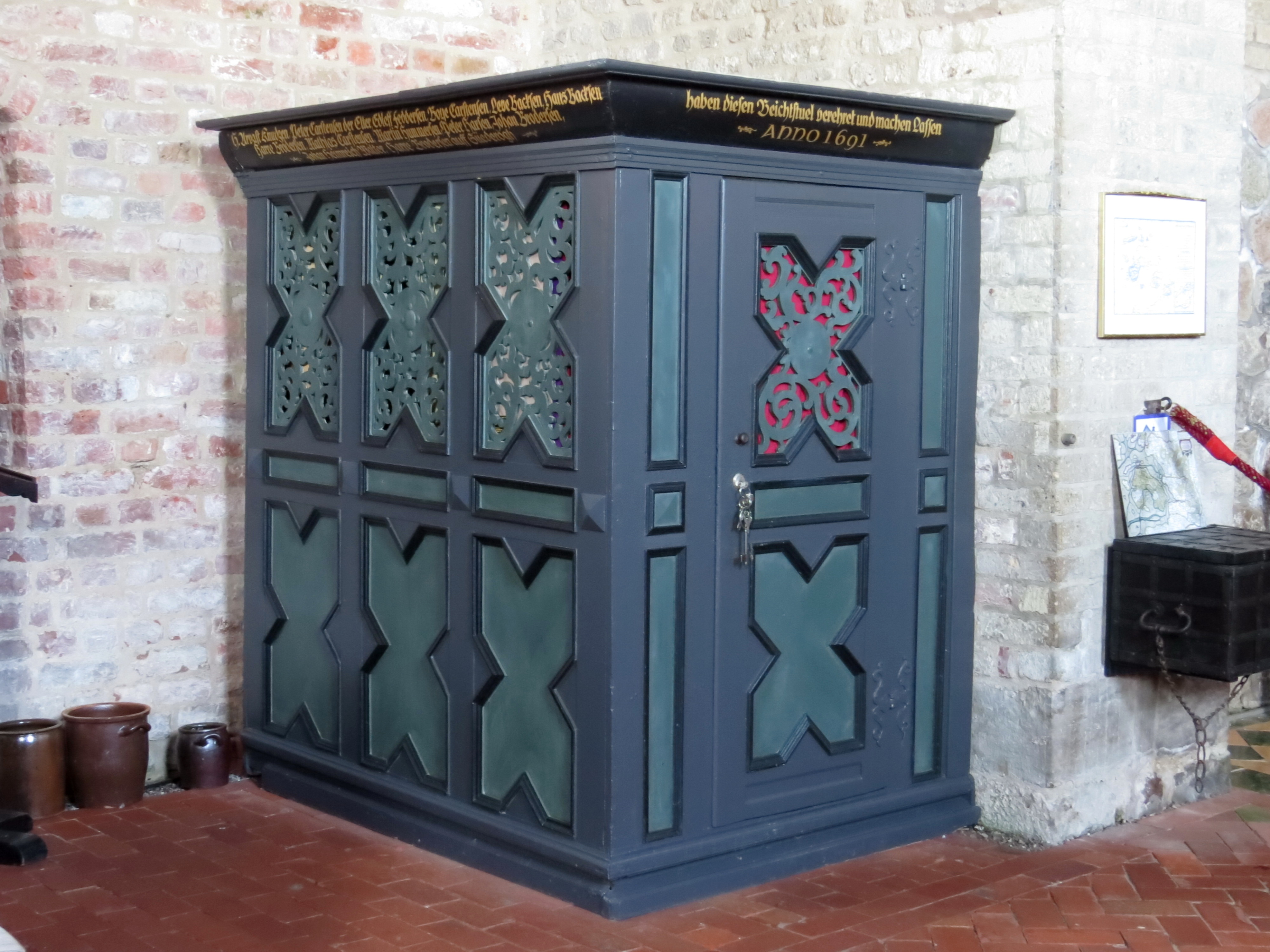 Altar der Alten Kirche Pellworm, Schleswig-Holstein